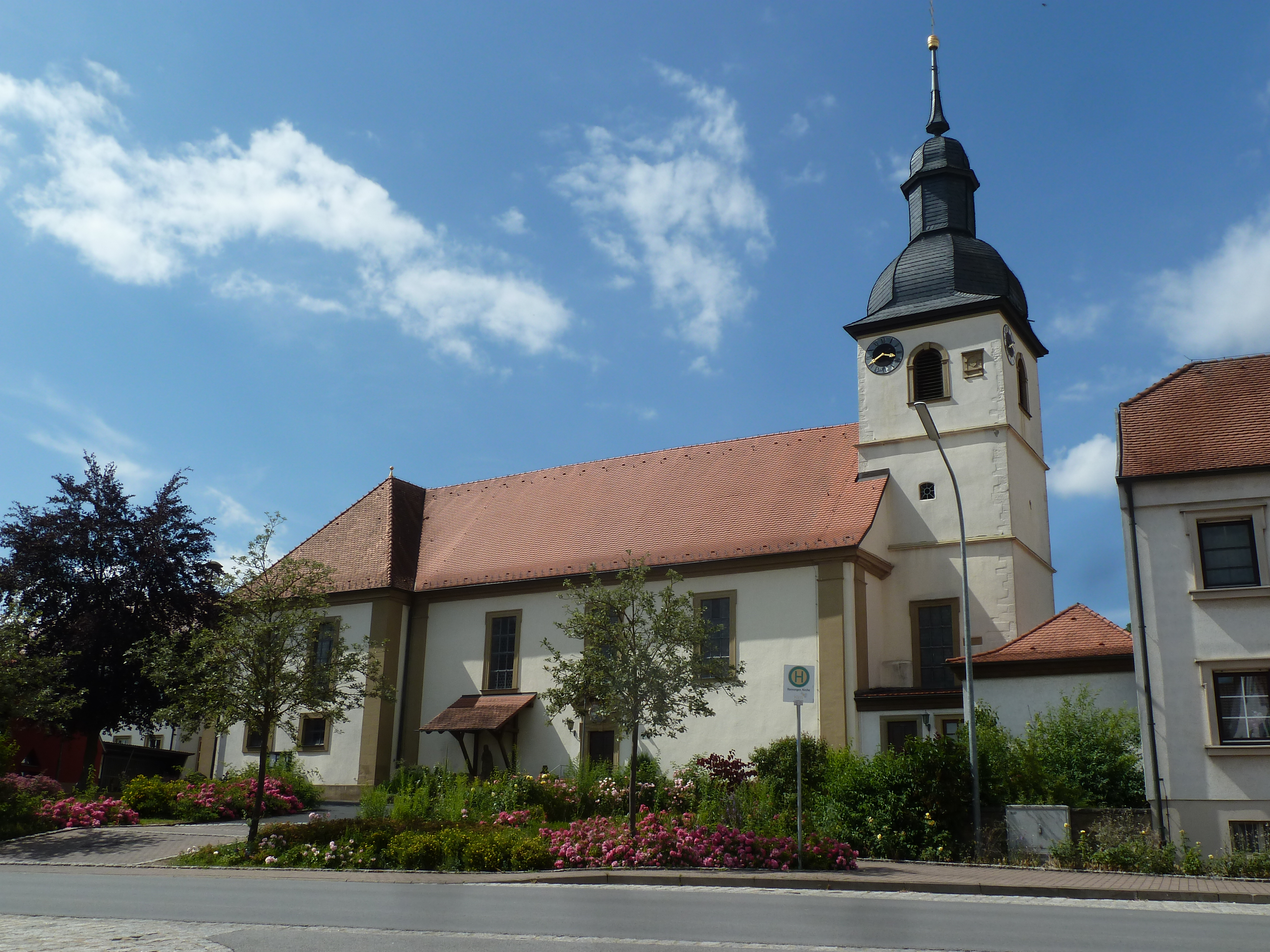 Die Pfarrkirche St. Bonifatius von Süden, Turm 1587/88, Hauptschiff 1716, Querschiff 1913.